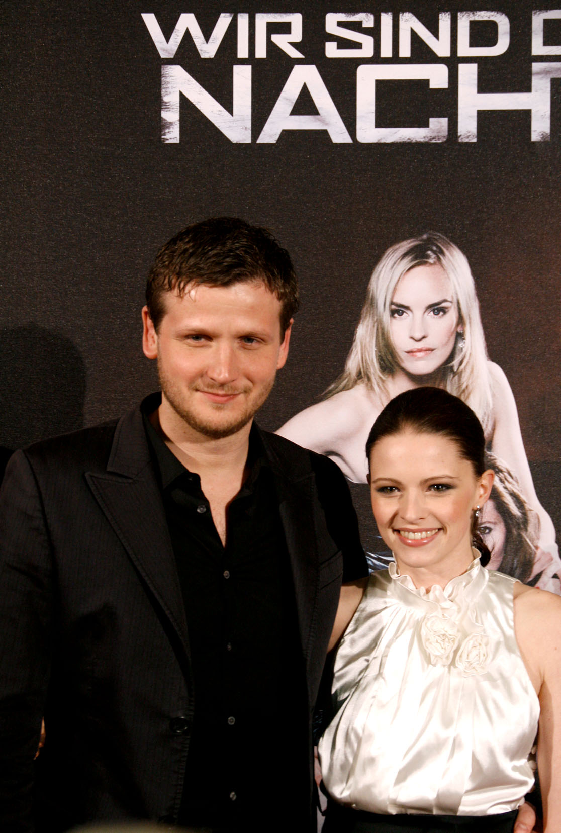 Dennis Gansel und Jennifer Ulrich bei der Österreichpremiere von Wir sind die Nacht im Apollo Kino in Wien.